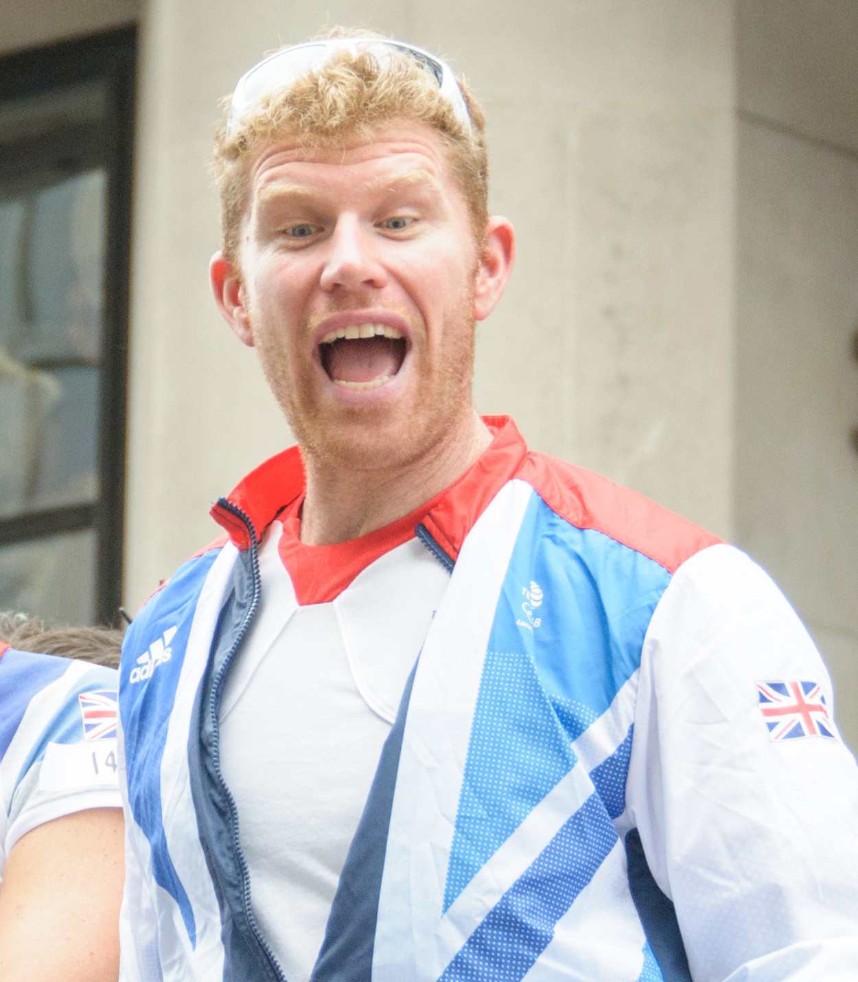 Kat Grainger